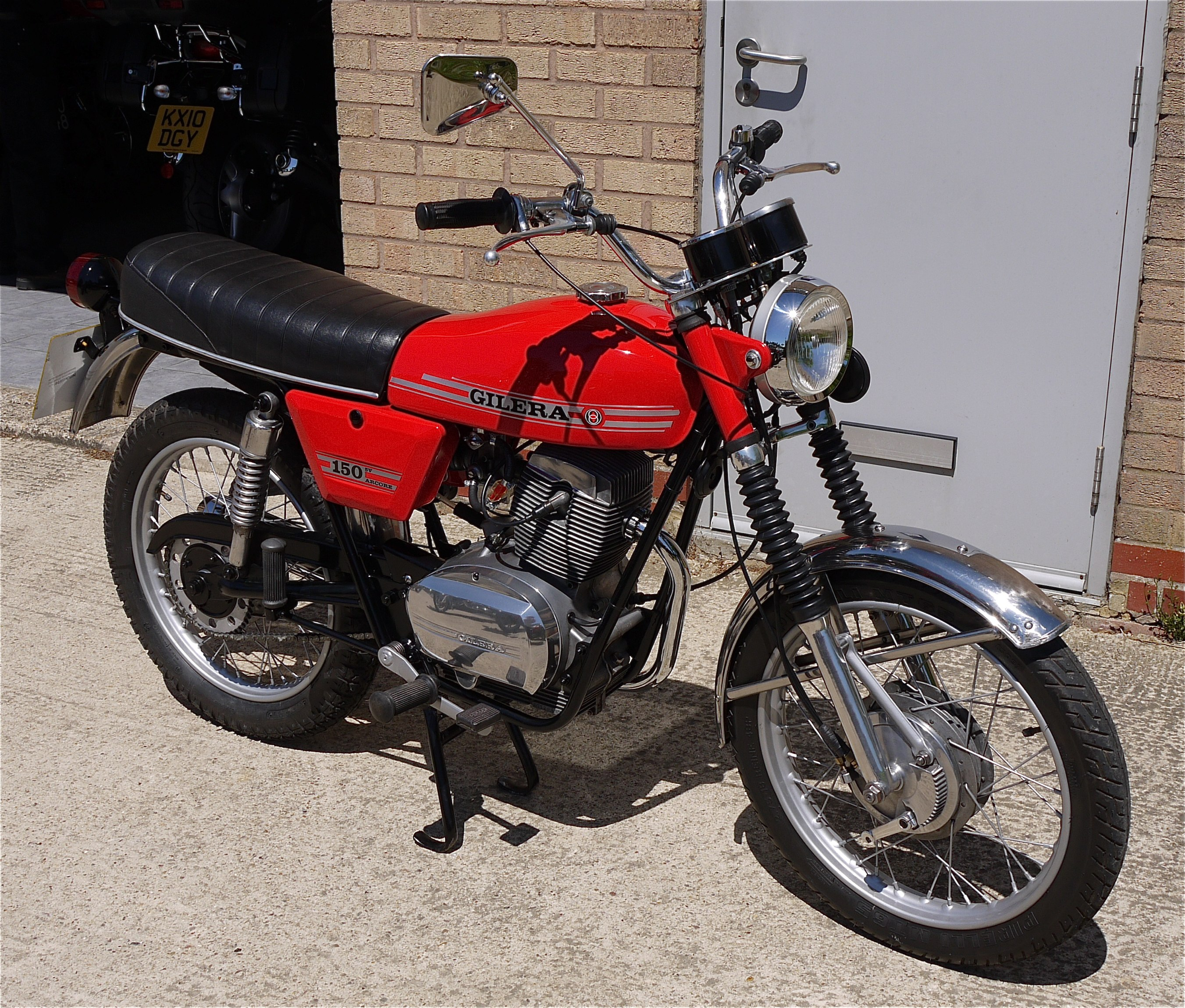 Panasonic G1 14-45 Lens